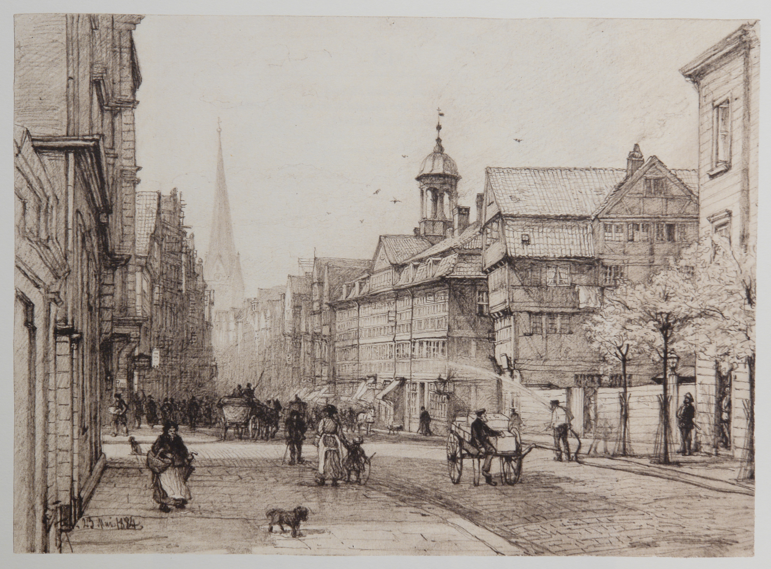 HAMBURG. Augenblicke einer Stadt 1882-1894. In 50 Zeichnungen von Johann Theobald Riefesell nach Originalen im Museum für Hamburgische Geschichte. Spitalerstraße 23-05-1884